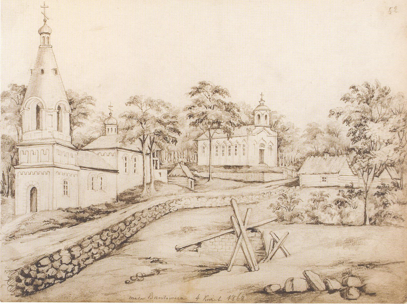 Беларуская (тарашкевіца): Малая Бераставіца (Małaja Bierastavica). Царква-мураўёўка і касьцёл Сьвятога Антонія